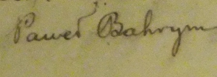 Аўтограф Паўлюка Багрыма